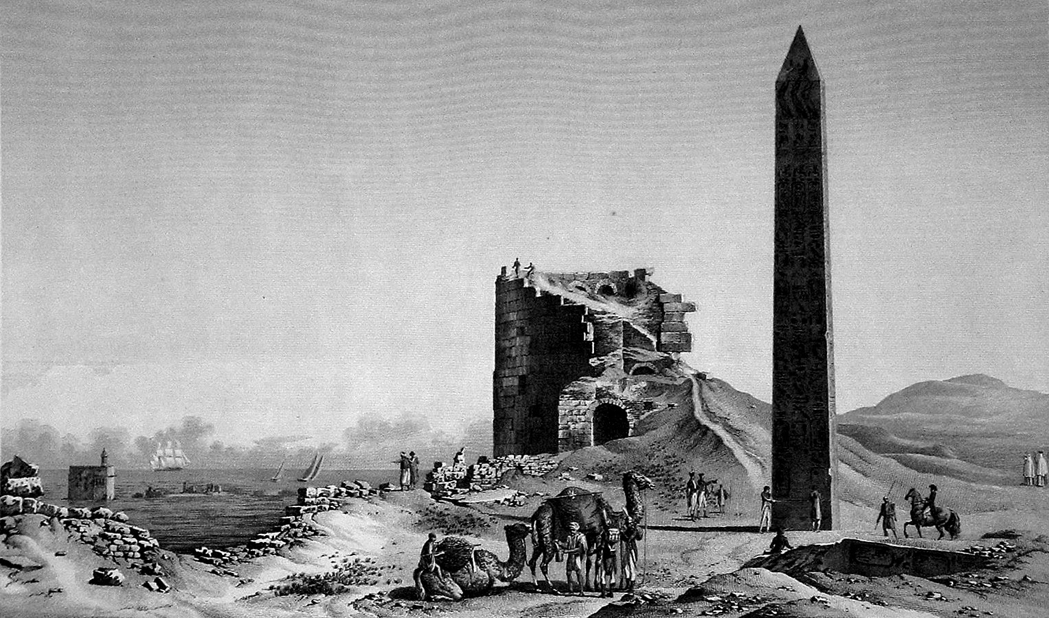 Alexander old drawings